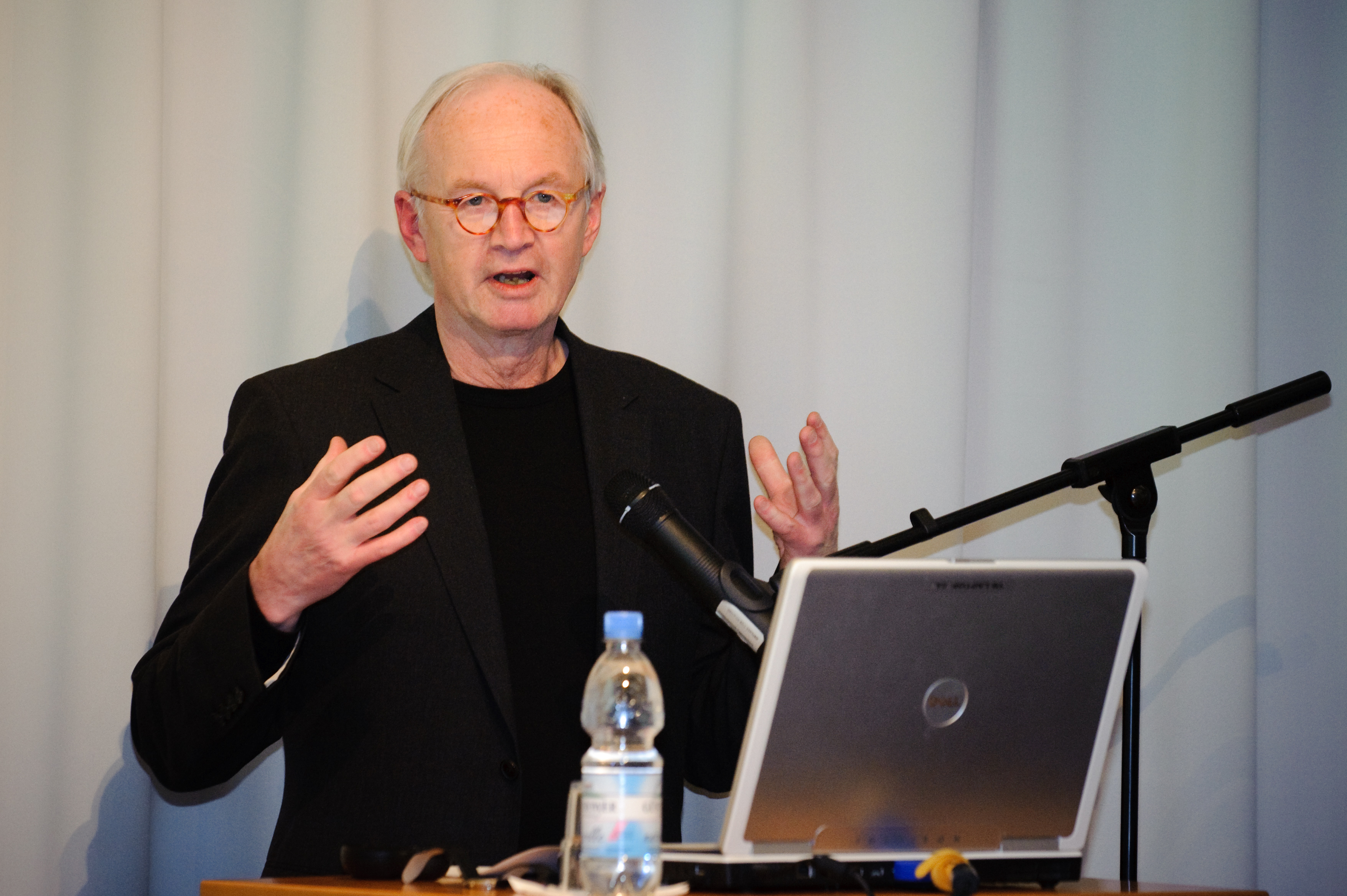 Buchvorstellung Deutsche Zustände - Folge 8 Foto: Stephan Röhl